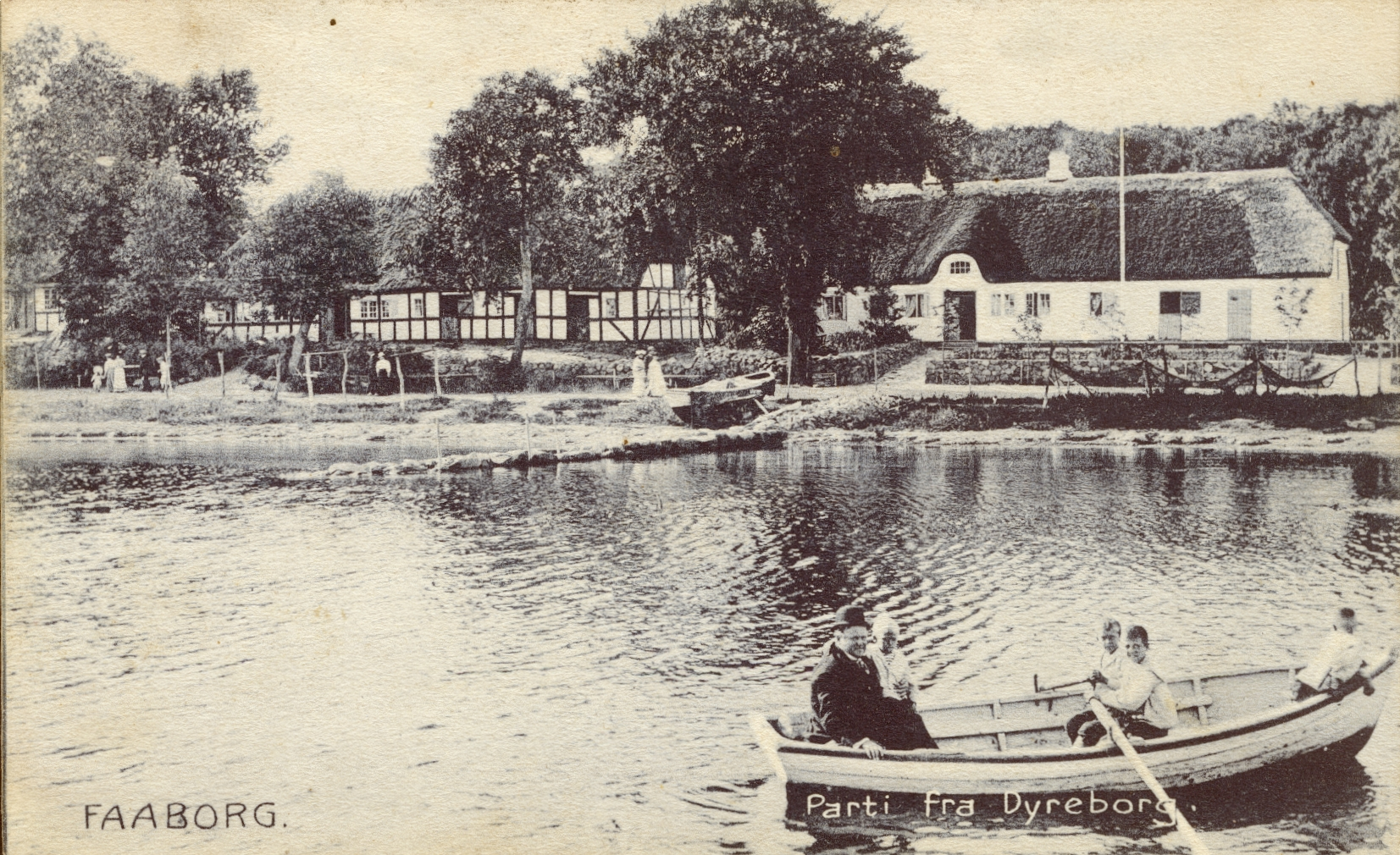 Parti fra Dyreborg ved Faaborg